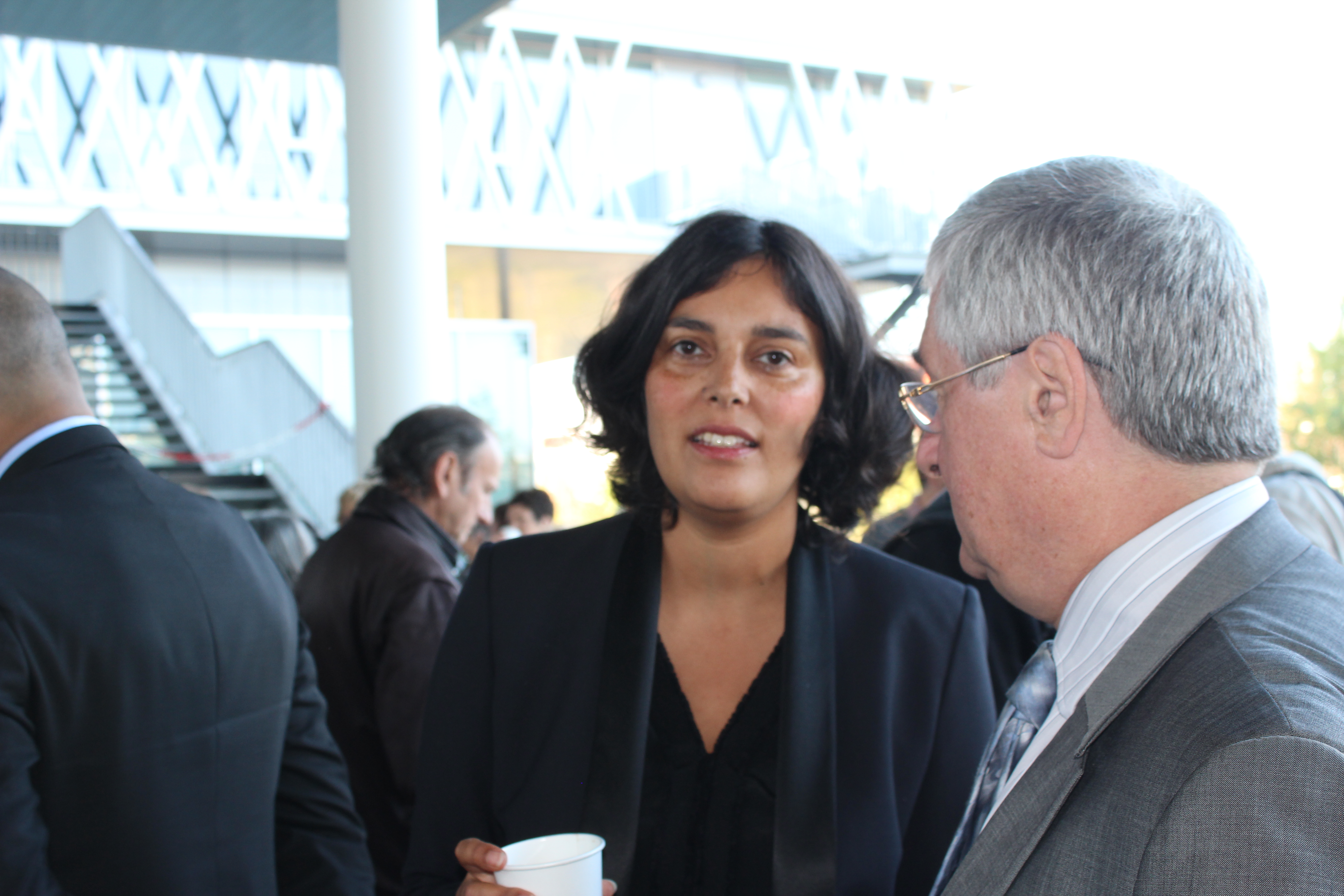 La secrétaire d'Etat à la ville Myriam El Khomri aux côtés du maire de Pierrefitte-sur-Seine Michel Fourcade aux Archives nationales à Pierrefitte le 27 septembre 2014